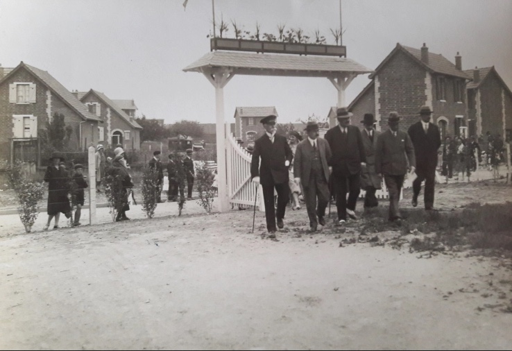 Le Havre - Inauguration du foyer Transatlantique (14 juin 1930) : MM Edde, Homberg, Fould, Tillier (de g. à d.) ; en arrière : MM Thooris, Taberthormière